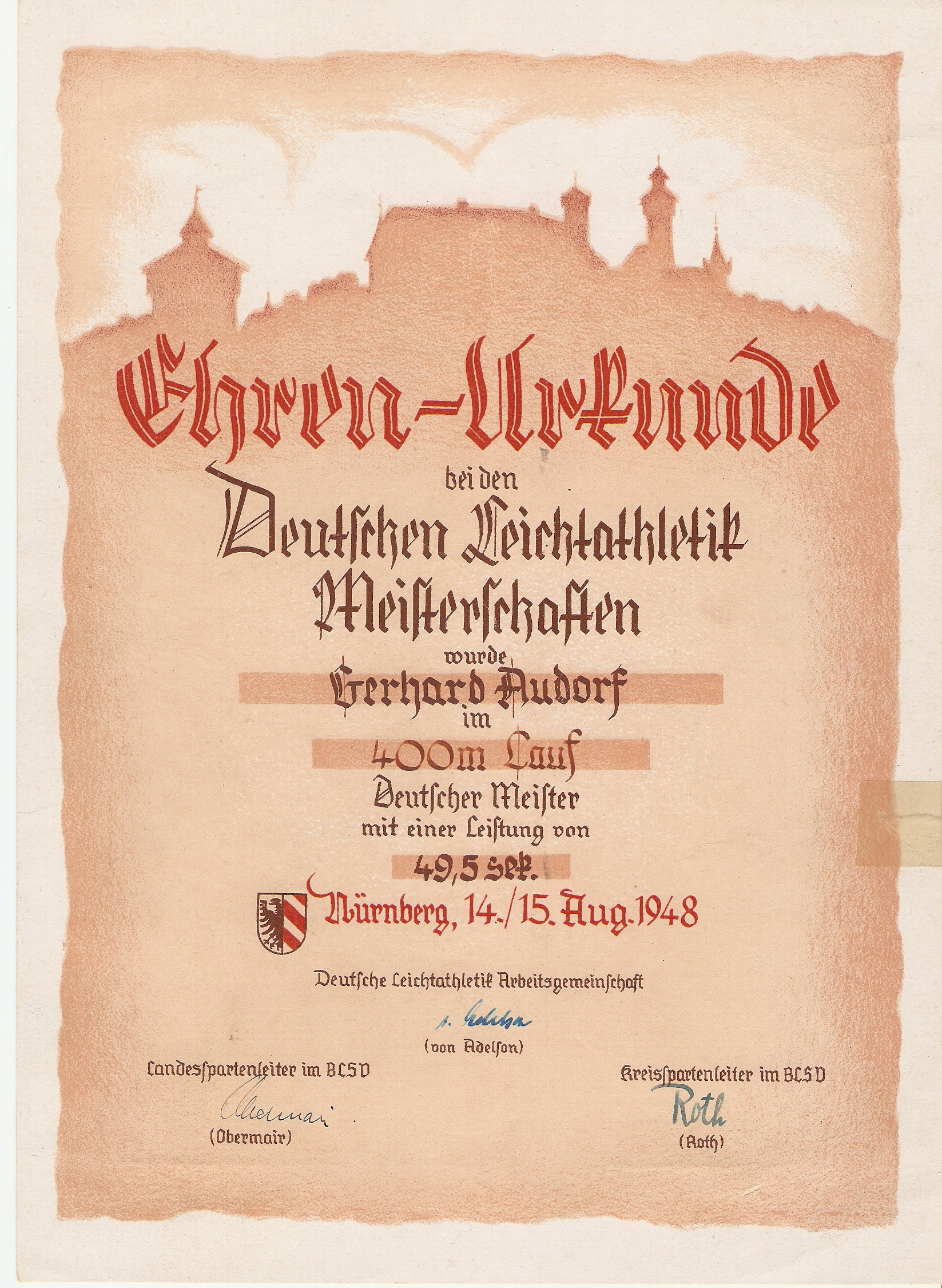 eingescannte Urkunde